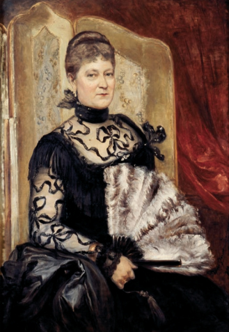 Thérèse Glaesener-Hartmann: Portrait vun der Madame Salentiny. MNHA (Inv. 1960-016/001)